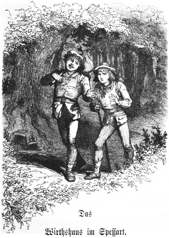 Illustration zu Wilhelm Hauffs Erzählung Das Wirtshaus im Spessart: Der Zirkelschmied und der Goldschmied auf dem Weg zur Herberge